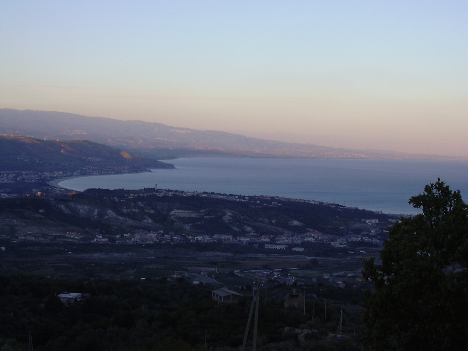 Golfo di Soverato (CZ)